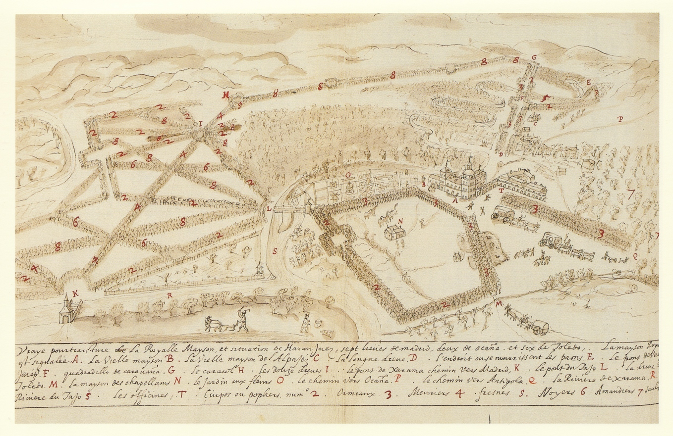 Vista de Aranjuez a finales del siglo XVI.